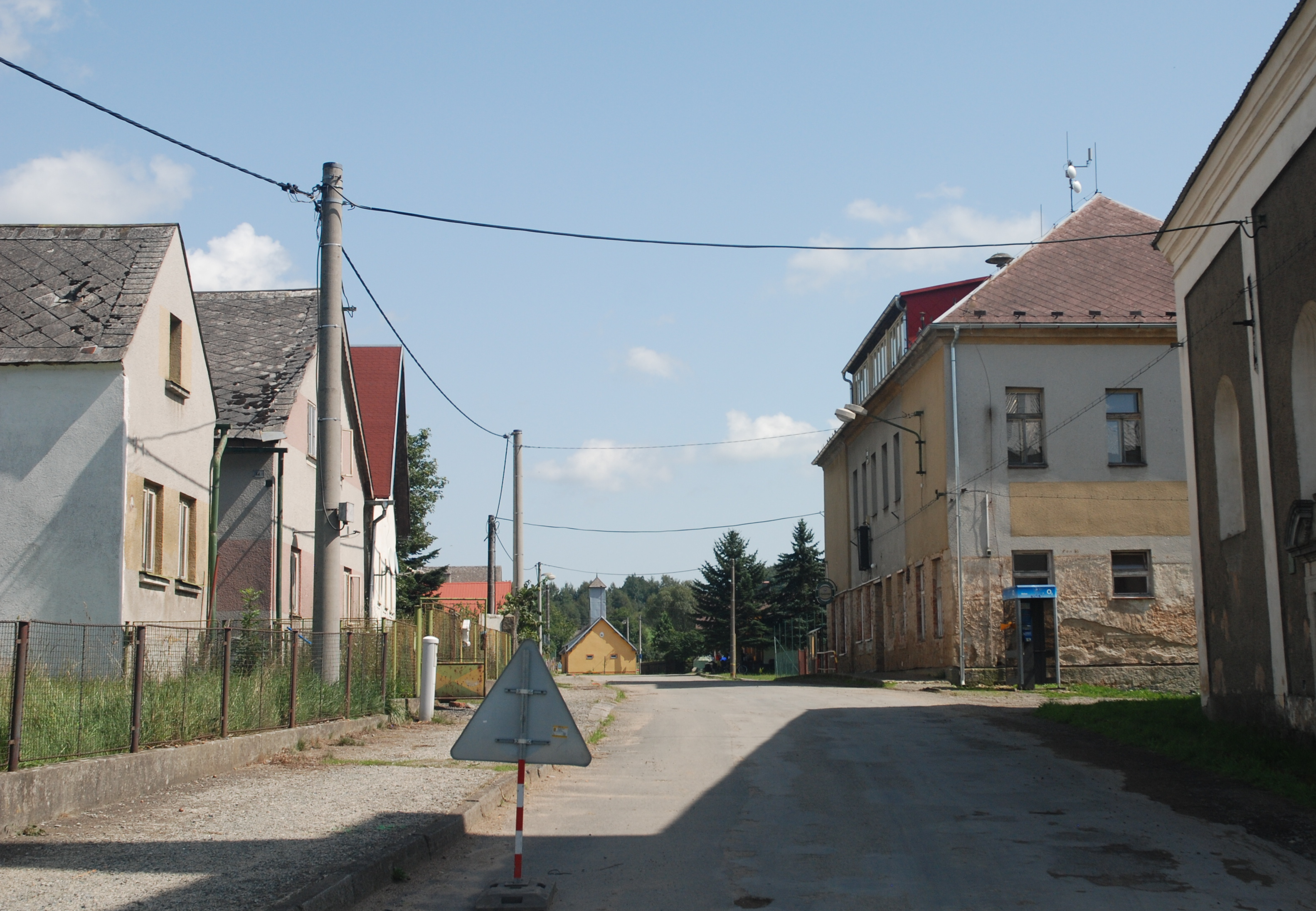 Hošťka